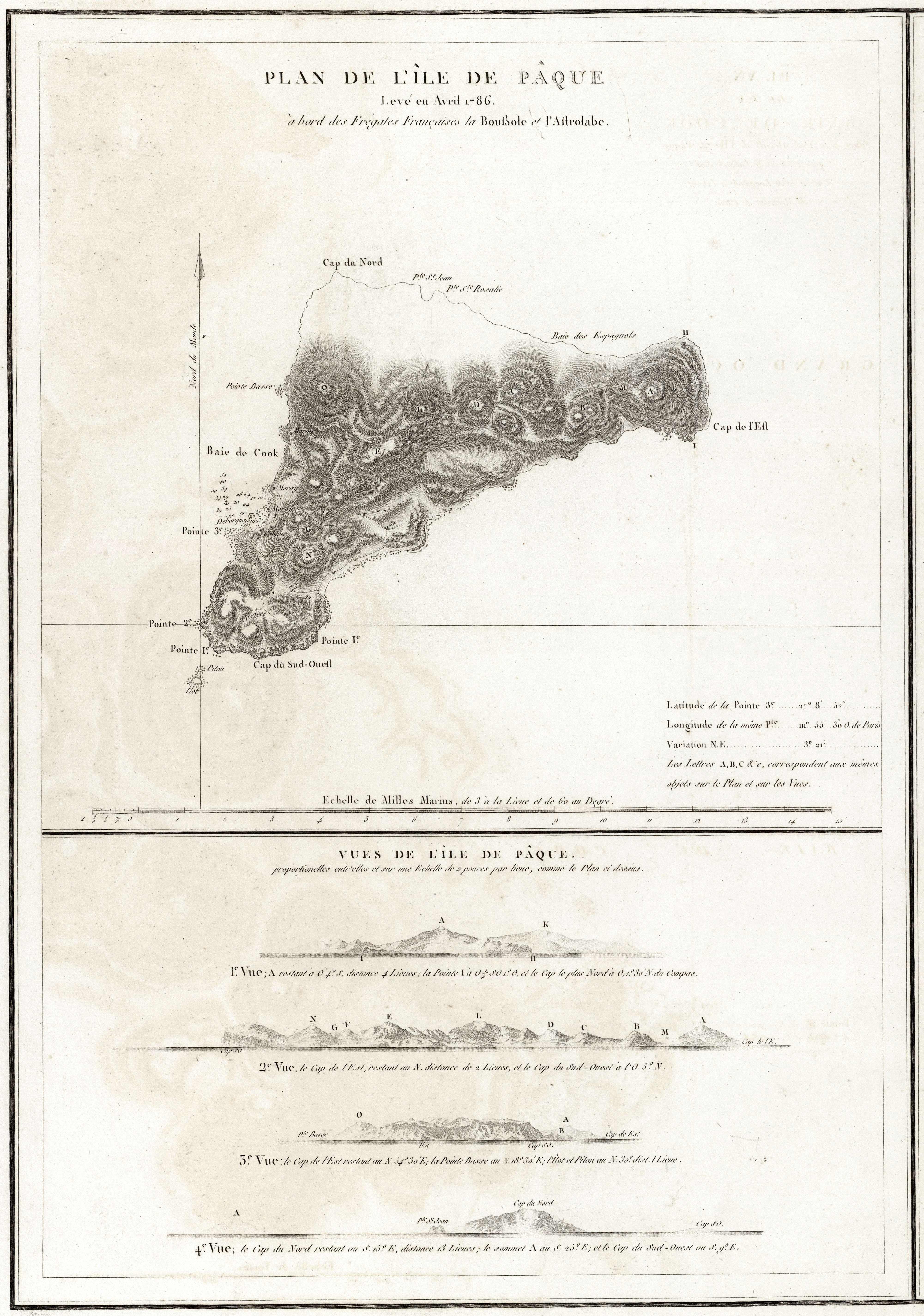 Plan de l'Isle de Paque. Leve en Avril 1786 a board des Frigates Francaises la Boussole et l'Astrolabe. Jean-Francois de Galaup La Perouse (1741-1788), 1797. Paris, L'Imprimerie de la Republique.